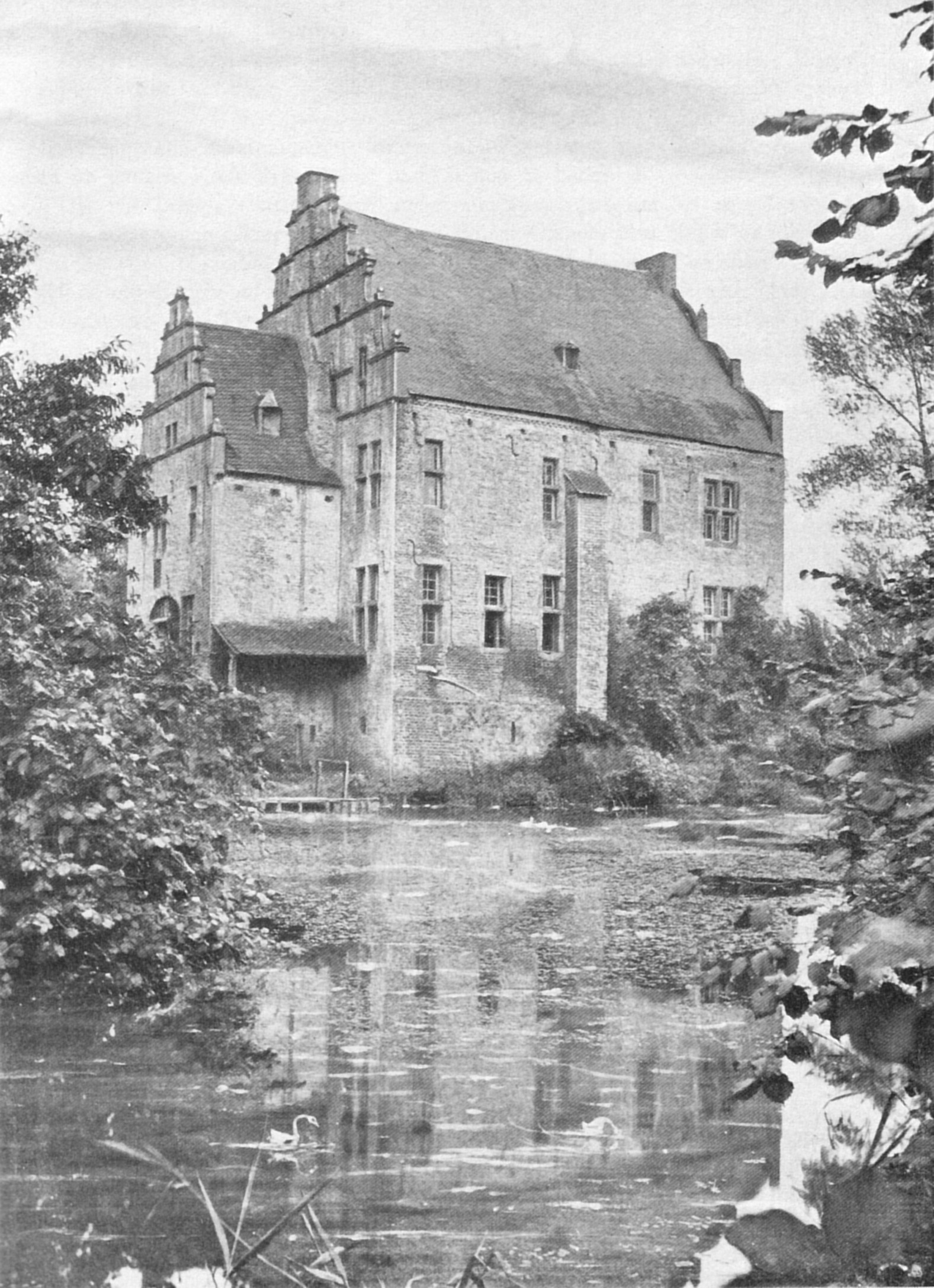 Das Burghaus des Ritterguts Grittern in Hückelhoven-Doveren